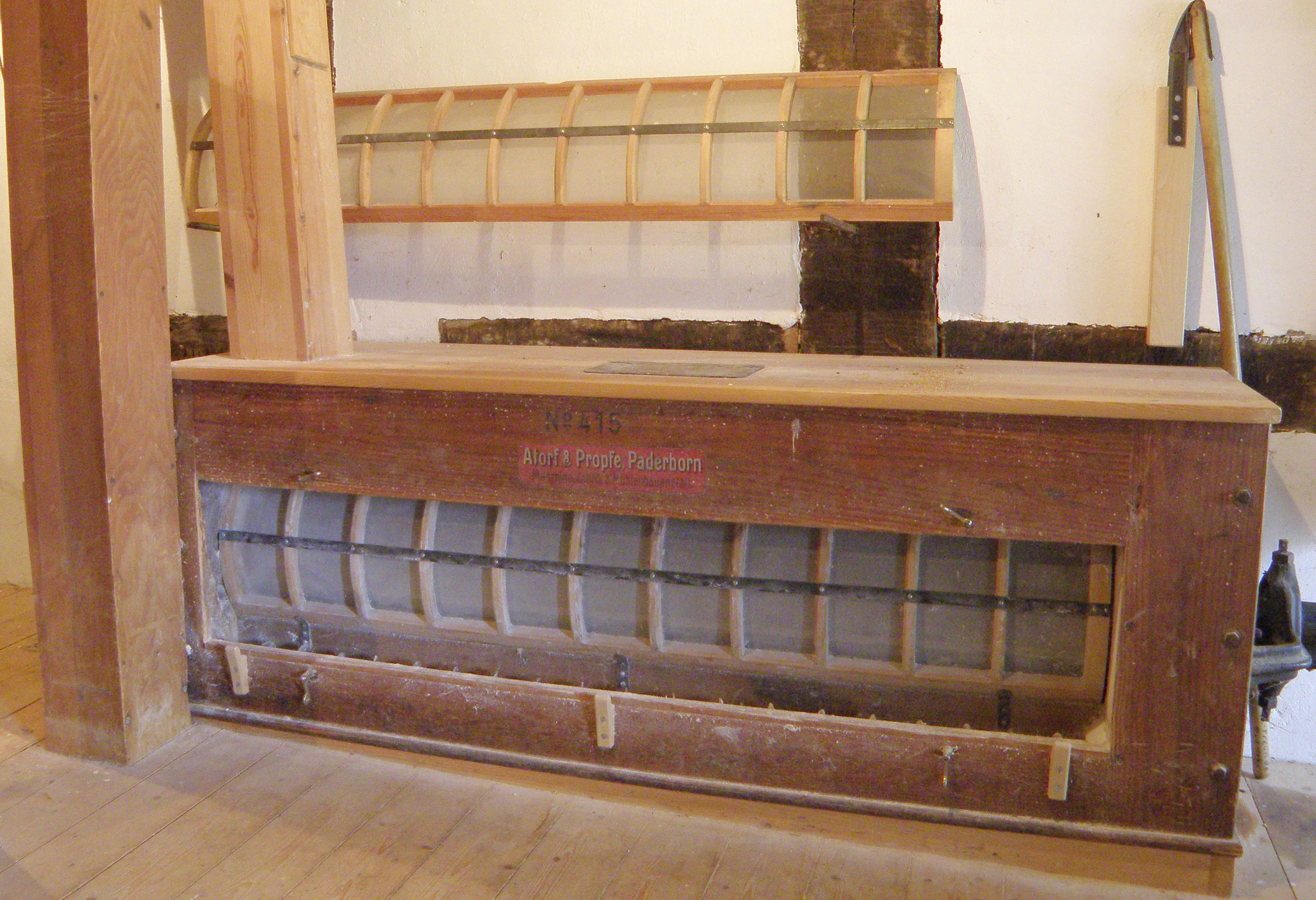 Sichter, Fa. Atrof & Propfe. Zu sehen ist -bei entferntem Deckel- der gazebespannte Korb sowie ein kleiner Teil der Förderschnecke unmittelbar darunter. An der Wand hängt ein Wechselkorb.